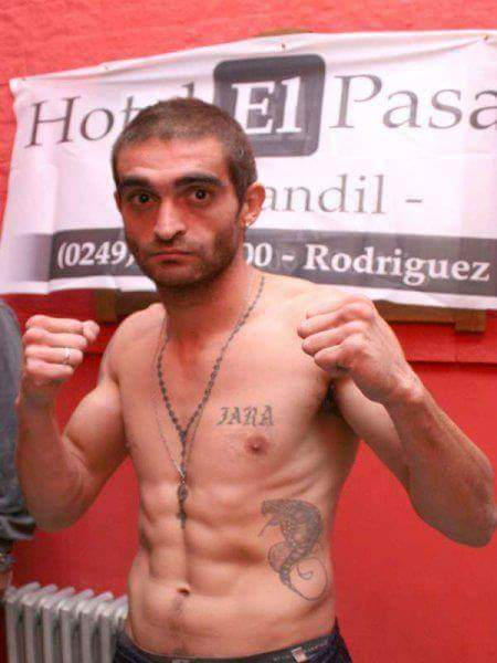 Imagen del Boxeador Argentino